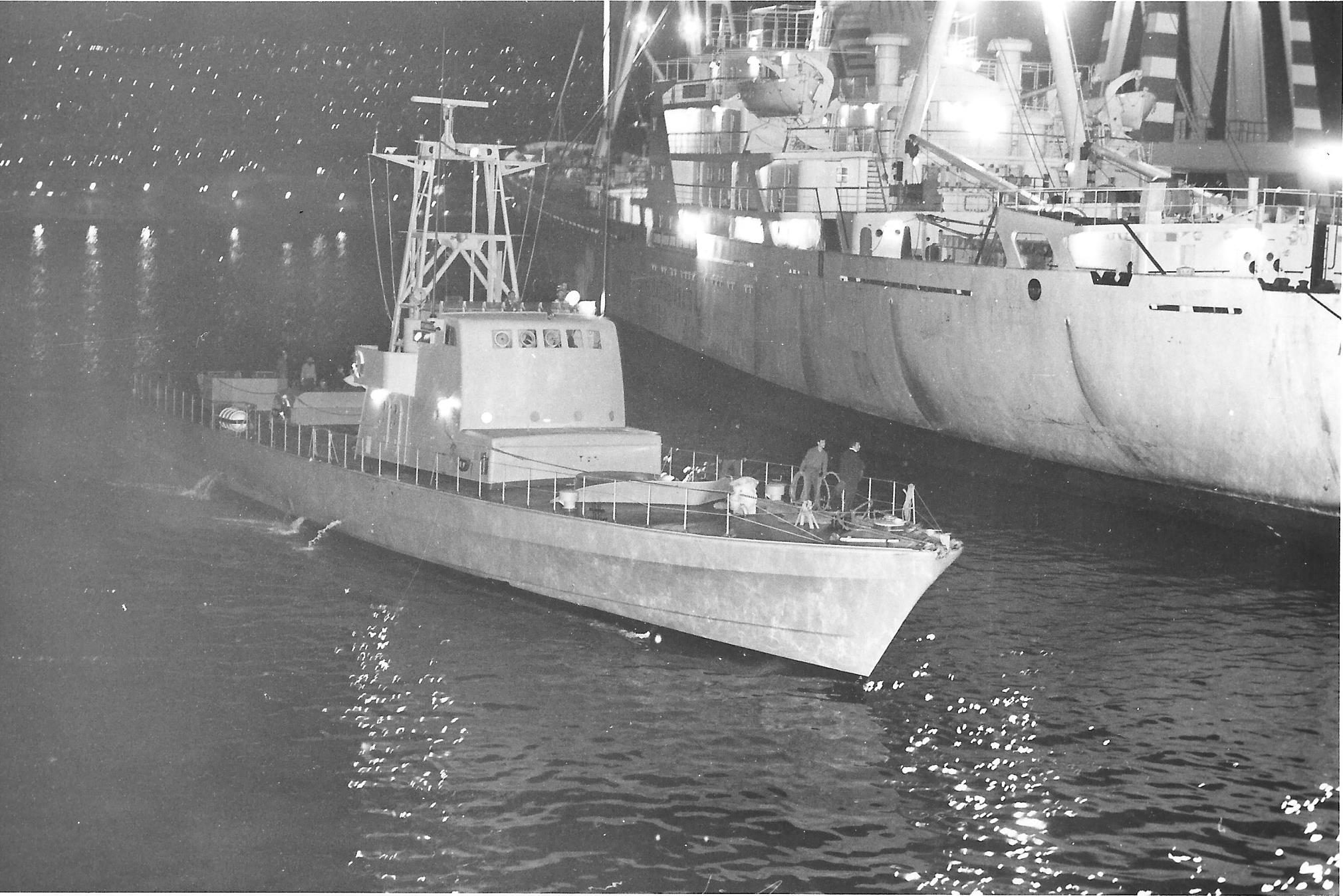 האחרונה מספינות שרבורג מתקרבת לרציף מספנות ישראל